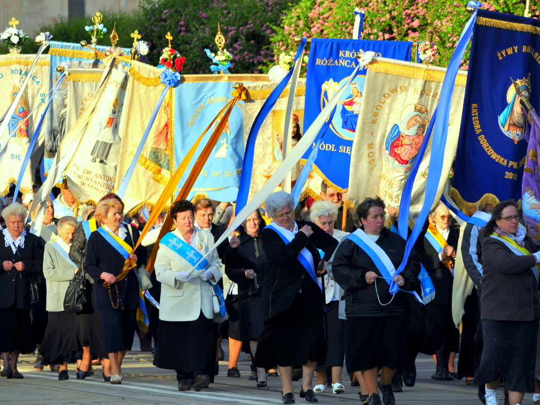 Procesja w Gorzowie Wlkp.- chorągwie kościelne.